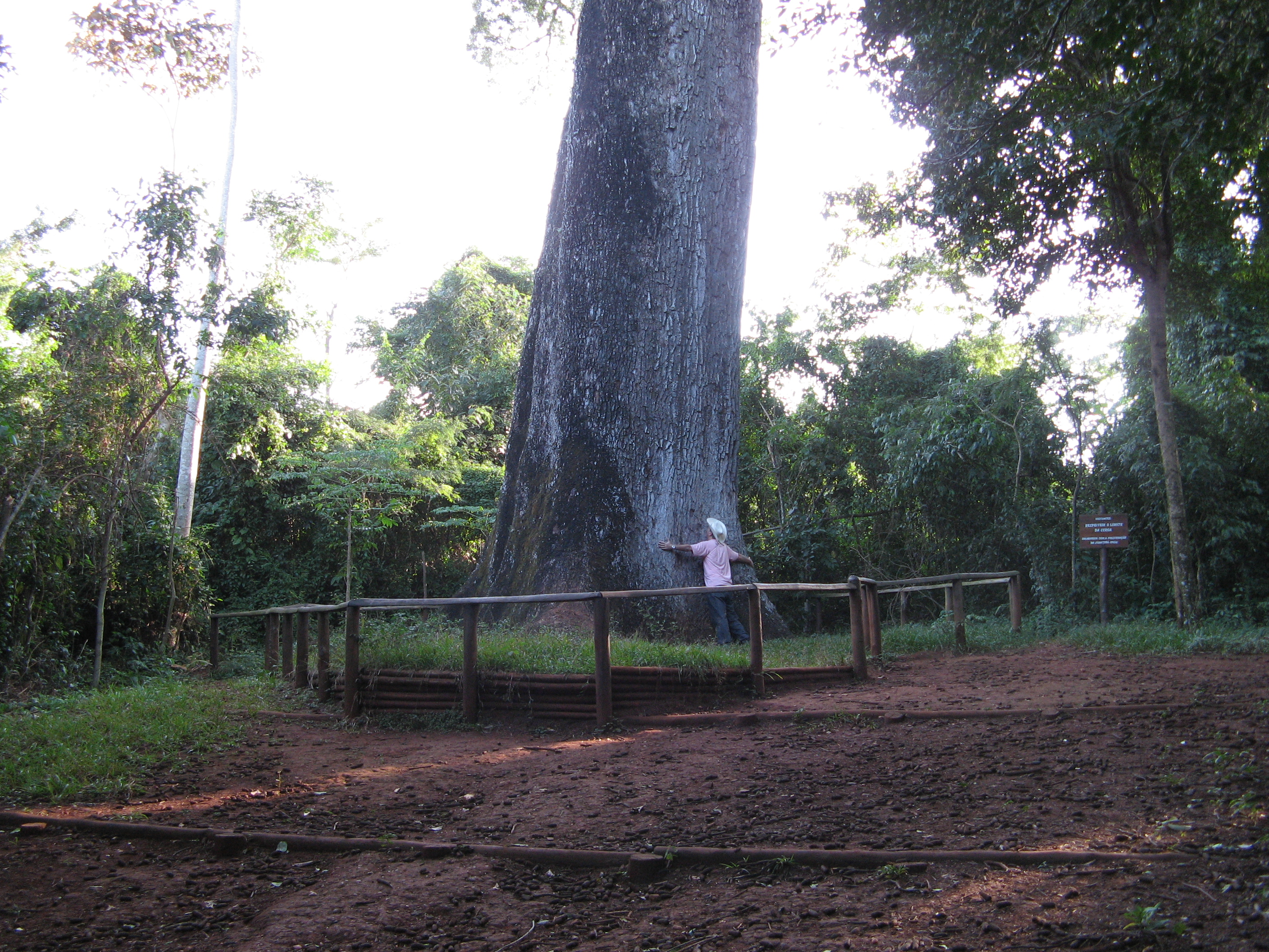 jequitiba rosa gigante de estimadas 3050 anos